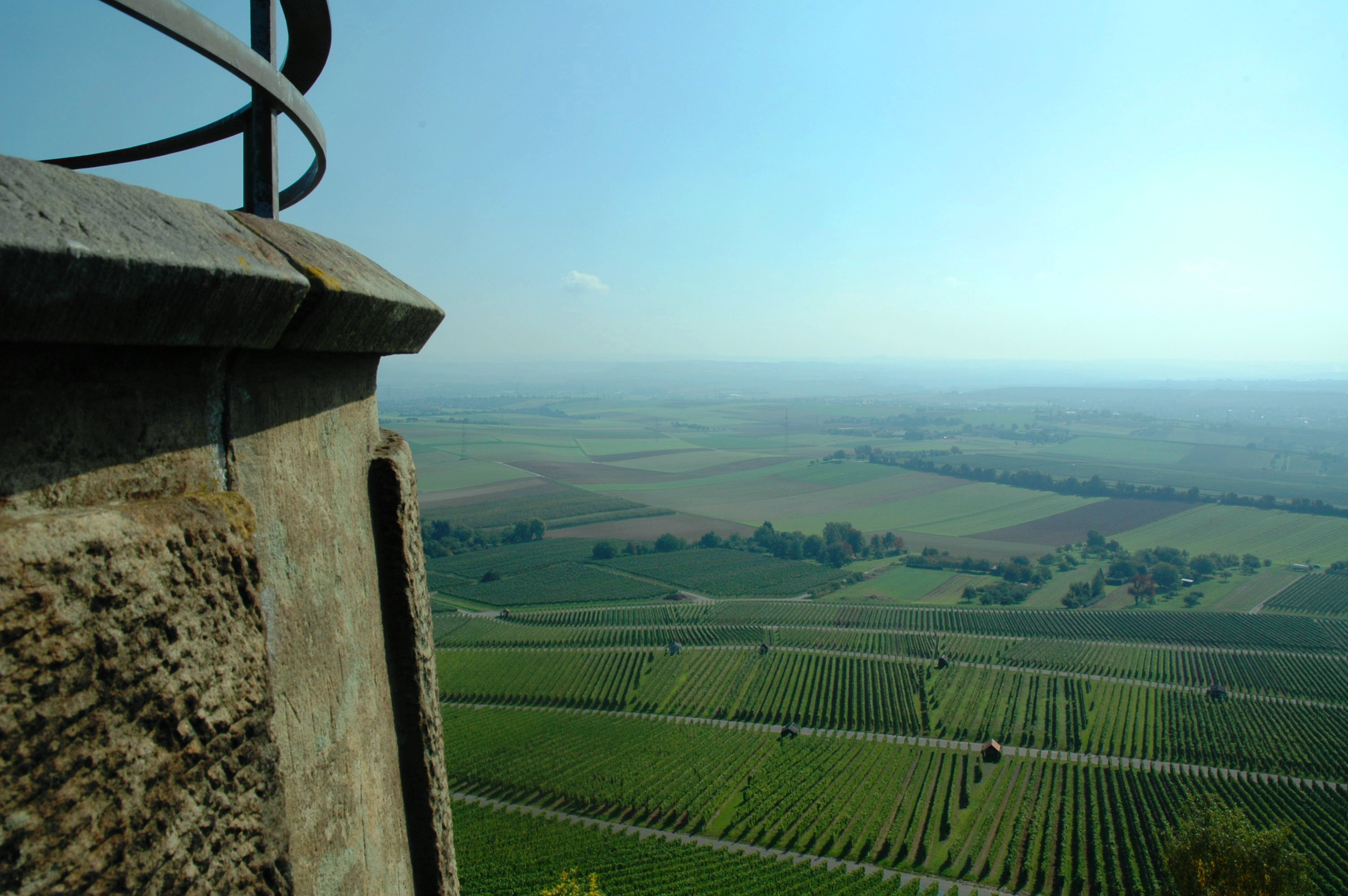 Hier ist der Ausblick vom Turm der Heuchelberger Warte über das Heilbronner Umland zu sehen